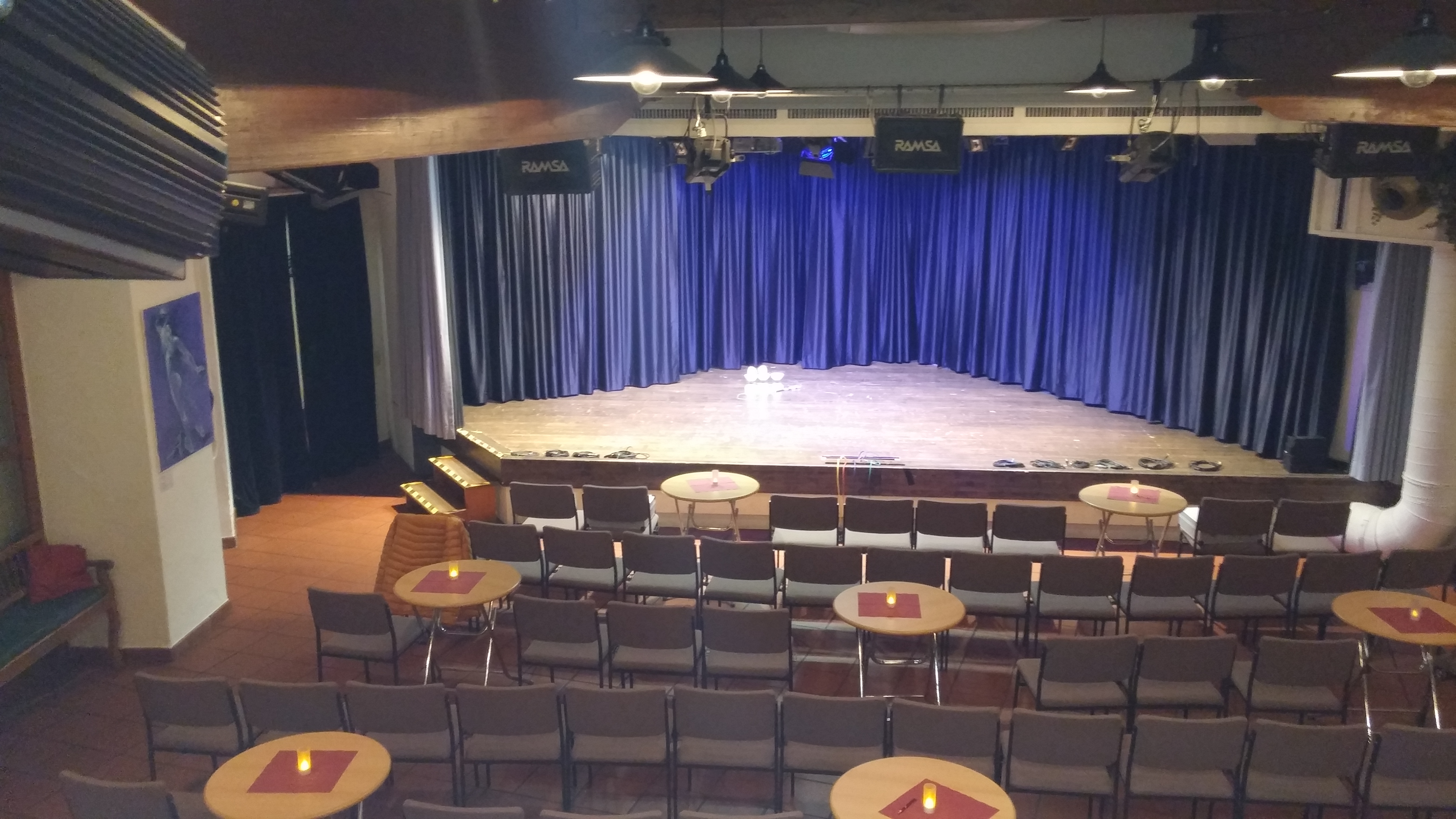 Urheber Das Glasperlenspiel in Asperg